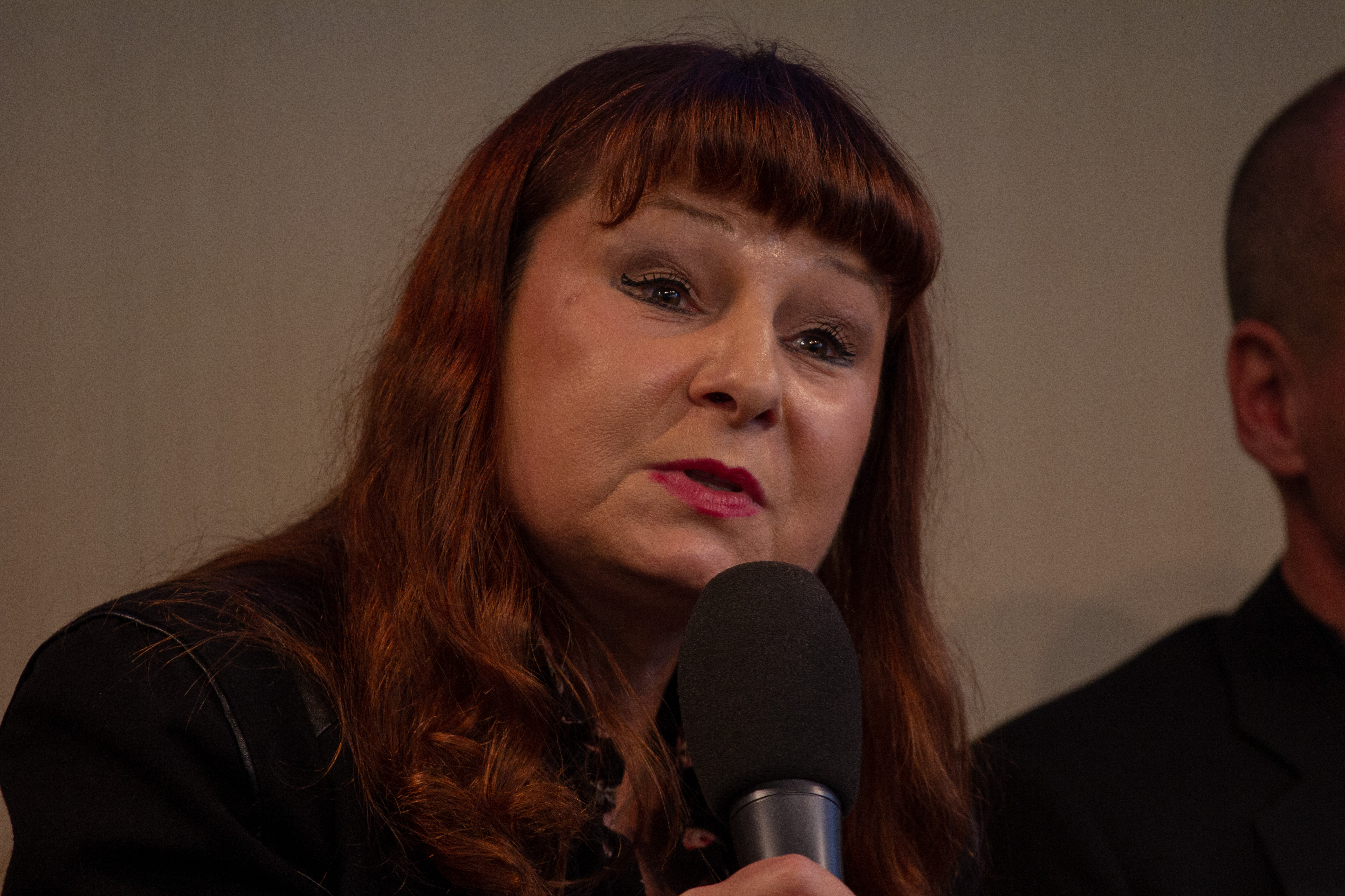 Veranstaltung "A Soul for Europe" am 13. April 2019 in der Akademie der Künste in Berlin. Representatives of European Parties: Carl Grouwet (ALDE), Damian Boeselager (Volt), Hannah Neumann (Bündnis 90/Die Grünen), Violeta Tomic (European Left), Yanis Varoufakis (DIEM25), Elmar Brok (MEP European People’s Party). With: Tanja Dückers, Noémi Kiss, Katja Sinko, Kathrin Röggla and Mia Florentine Weiss. Intervention by Volker Schlöndorff and Hannes Swoboda (former MEP). Moderation: Volker Hassemer